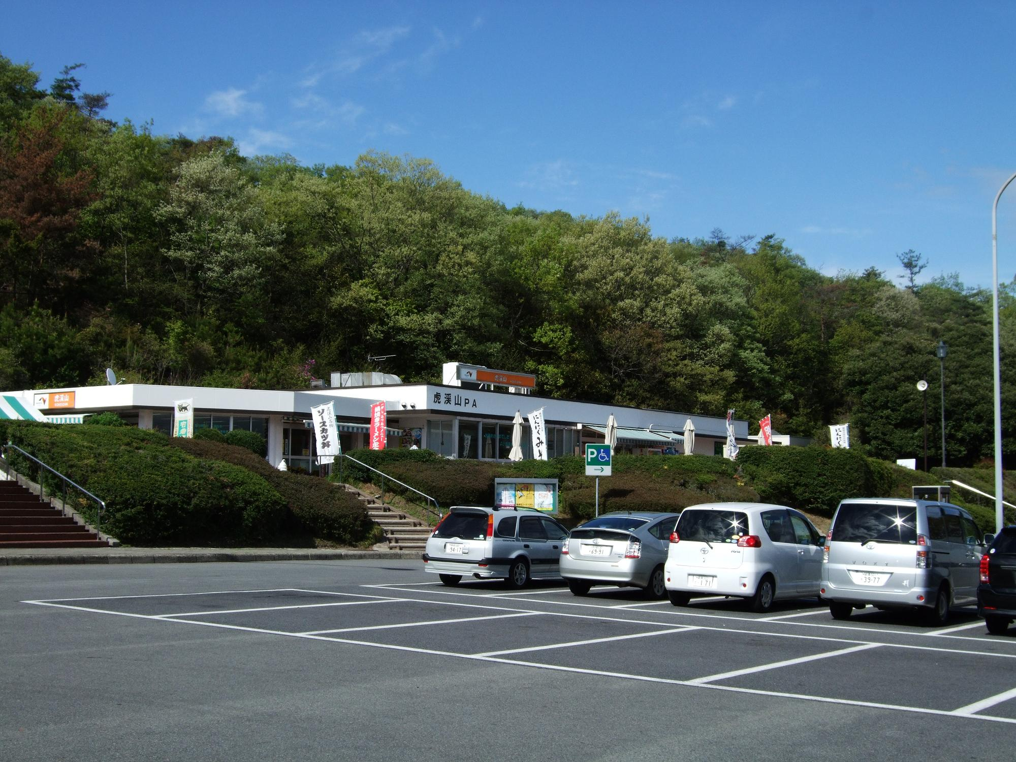 中央自動車道 虎渓山パーキングエリア 2008.4.19 投稿者が撮影